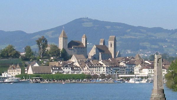 Schloss und Altstadt von Rapperswil SG am Zürichsee. Im Hintergrund ist der Bachtel zu erkennen.